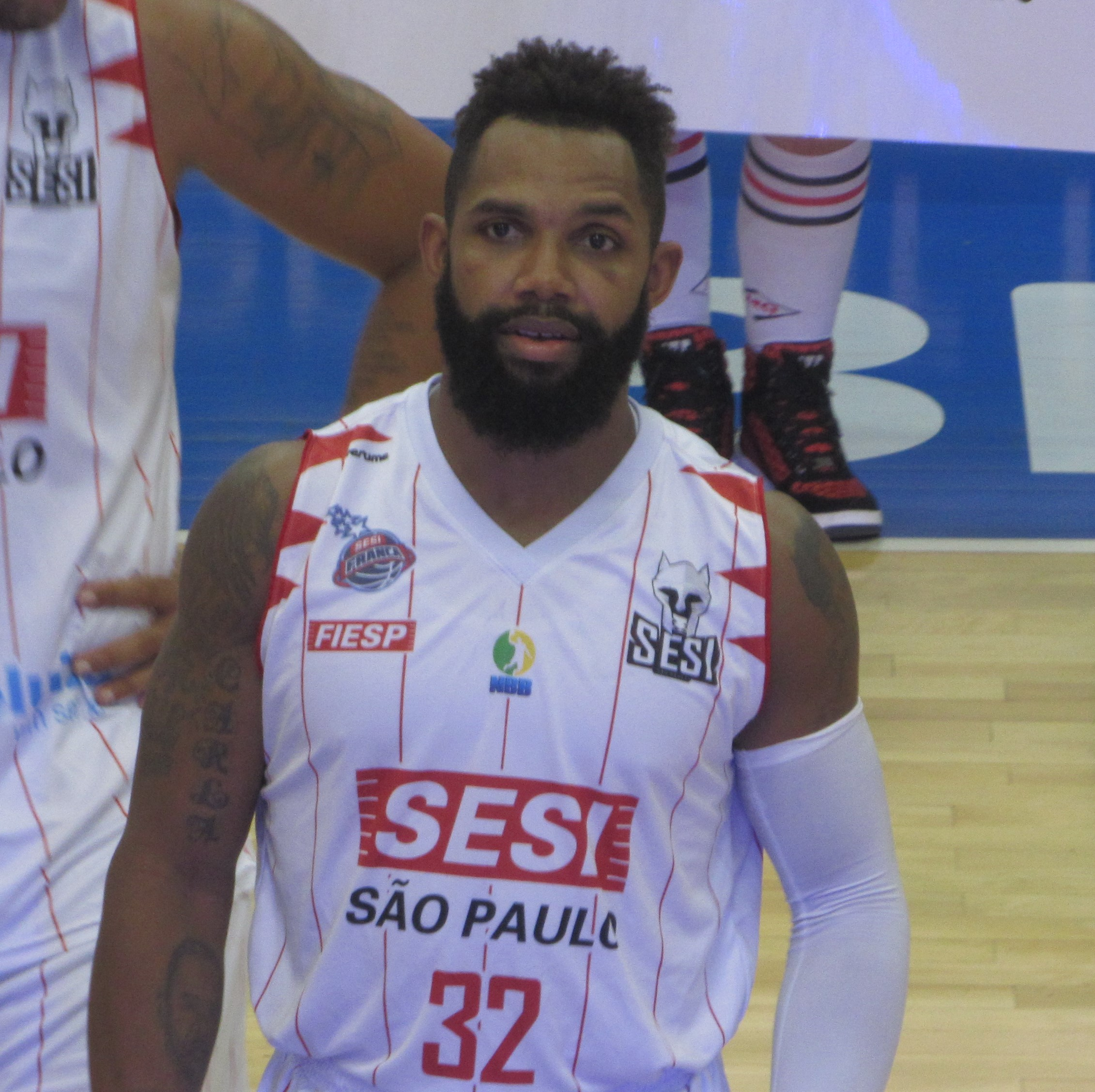 Imagem de David Jackson capturada durante o jogo entre Franca Basquete e Basquete Cearense no Ginásio Pedrocão (em Franca/SP), no dia 12 de janeiro de 2019.